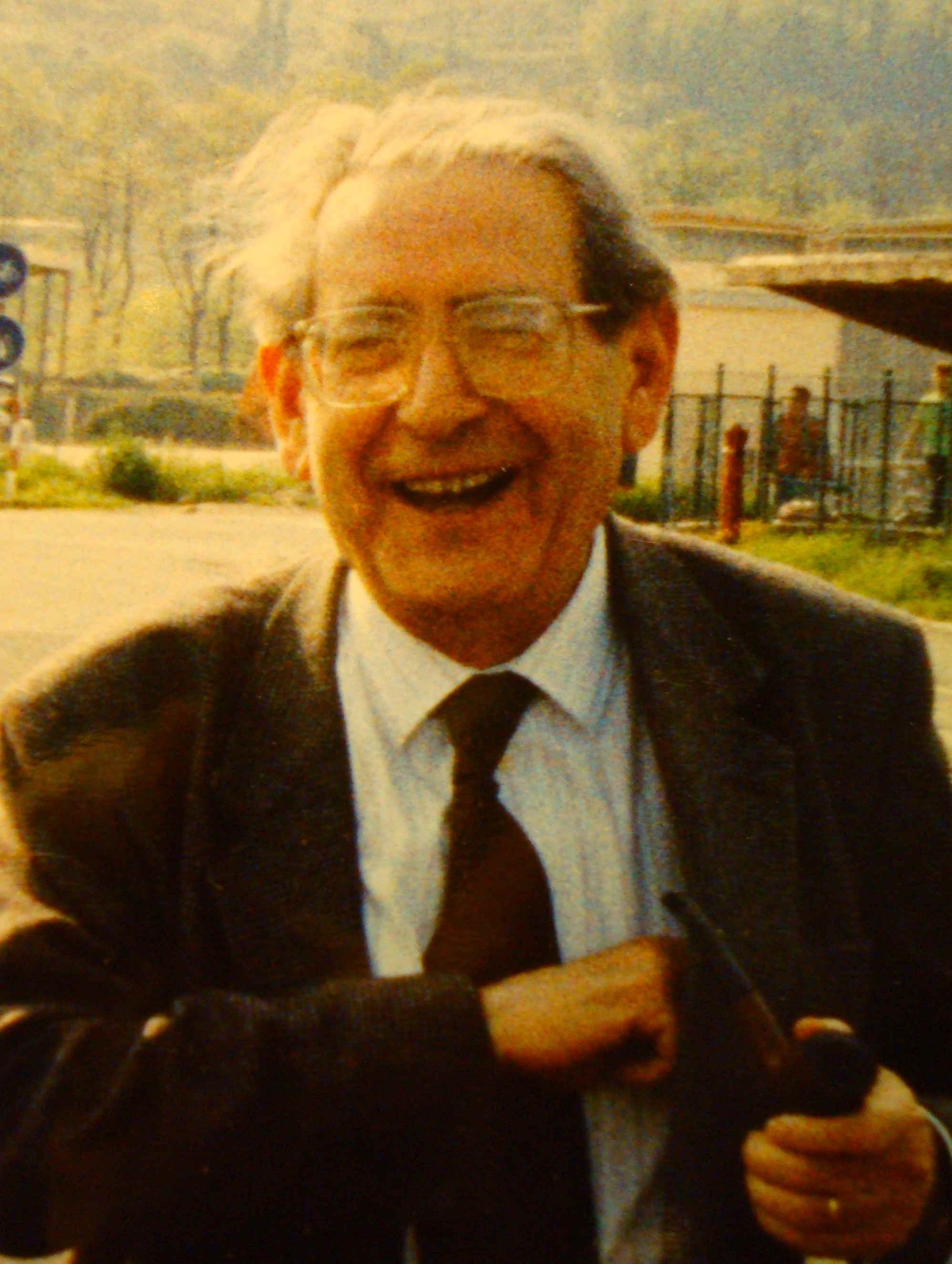 Luigi Crocetti alla inaugurazione della Biblioteca Comunale di Bagno a Ripoli (FI), 1990